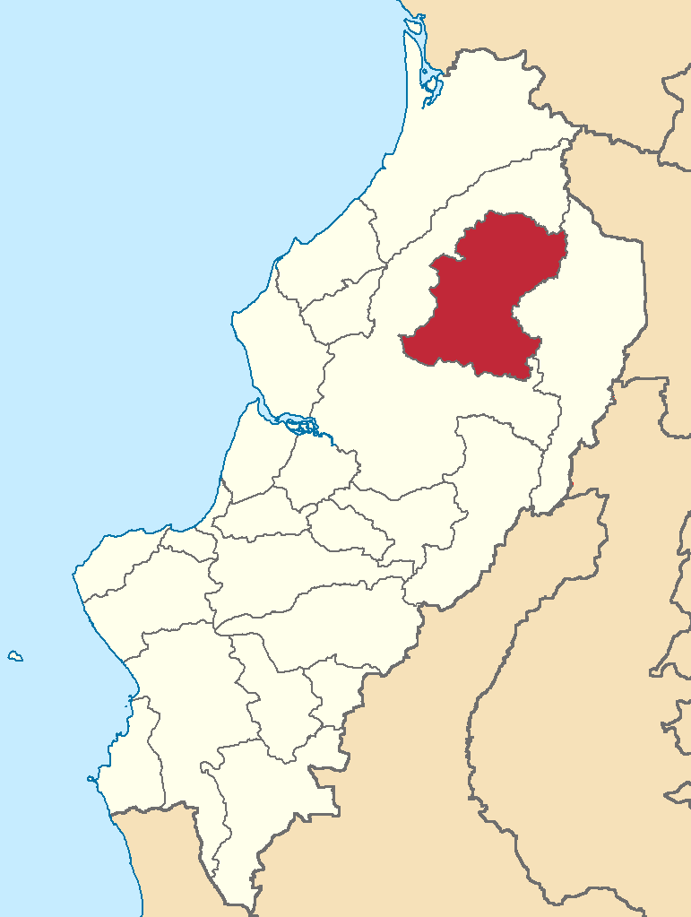 Mapa localizador del cantón en Manabí, Ecuador